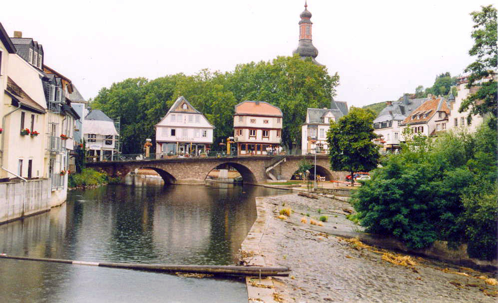 Die Nahe-Brücke von Bad Kreuznach, eigenes Bild, GNU FDL